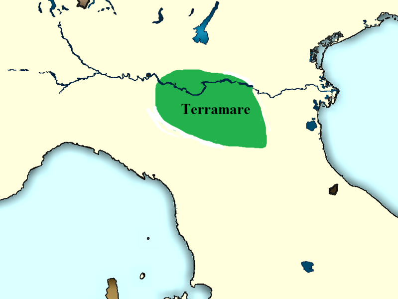 Territoire dit "Terramare" dans la plaiendu Pô en Italie du Nord.